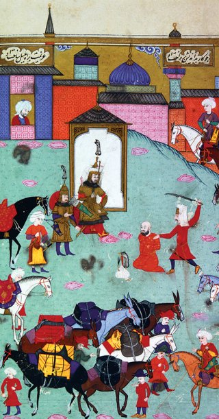 Âsi Kırım hanı II. Mehmed Giray’ın 1584’te başının kesilmesini gösteren bir minyatür (Şehinşâhnâme, İÜ Ktp., FY, nr. 1404, vr. 109b)